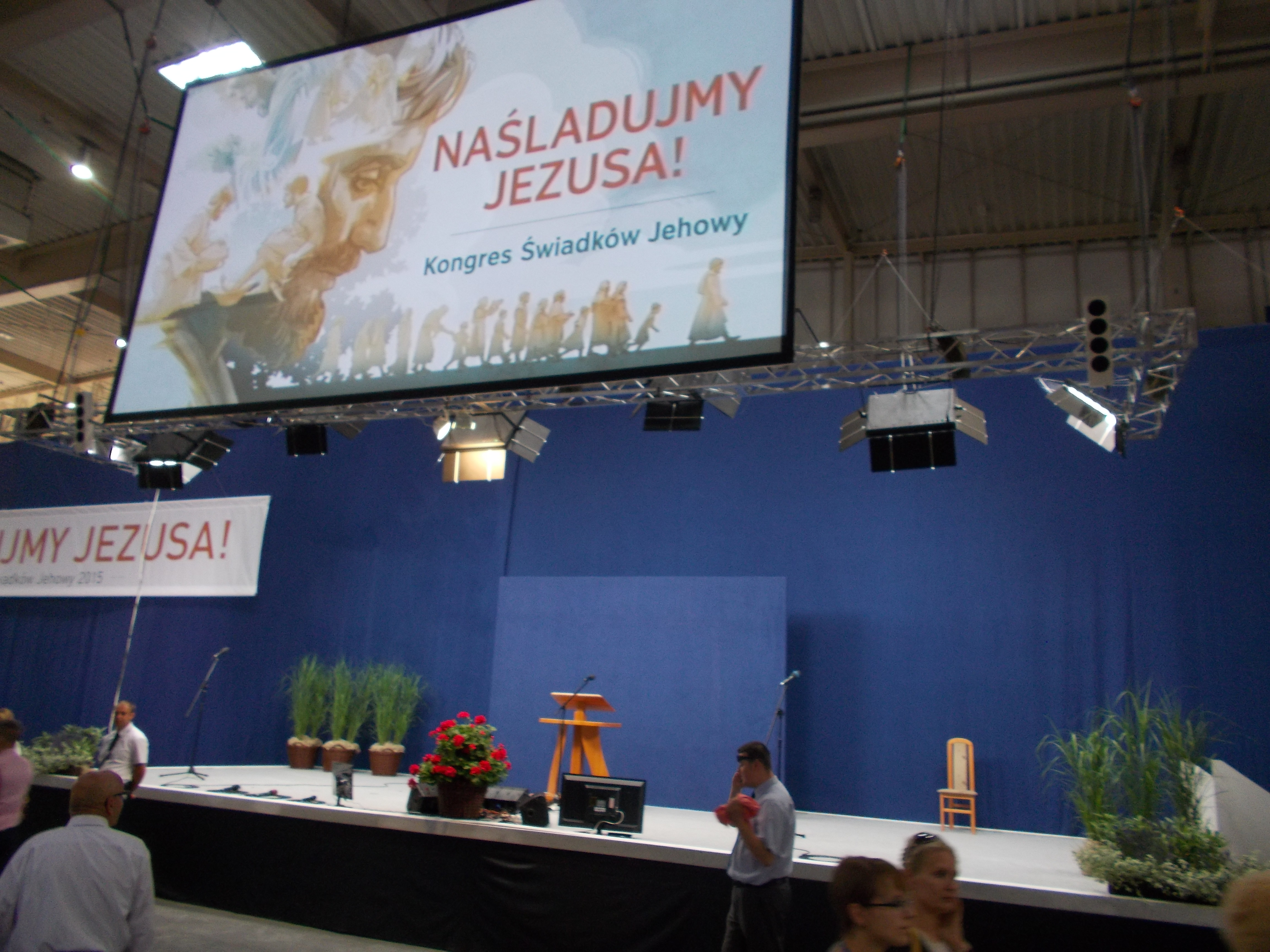 Scena. Kongres "Naśladujmy Jezusa" w Poznaniu. Teren Międzynarodowych Targów Poznańskich. Rok 2015.